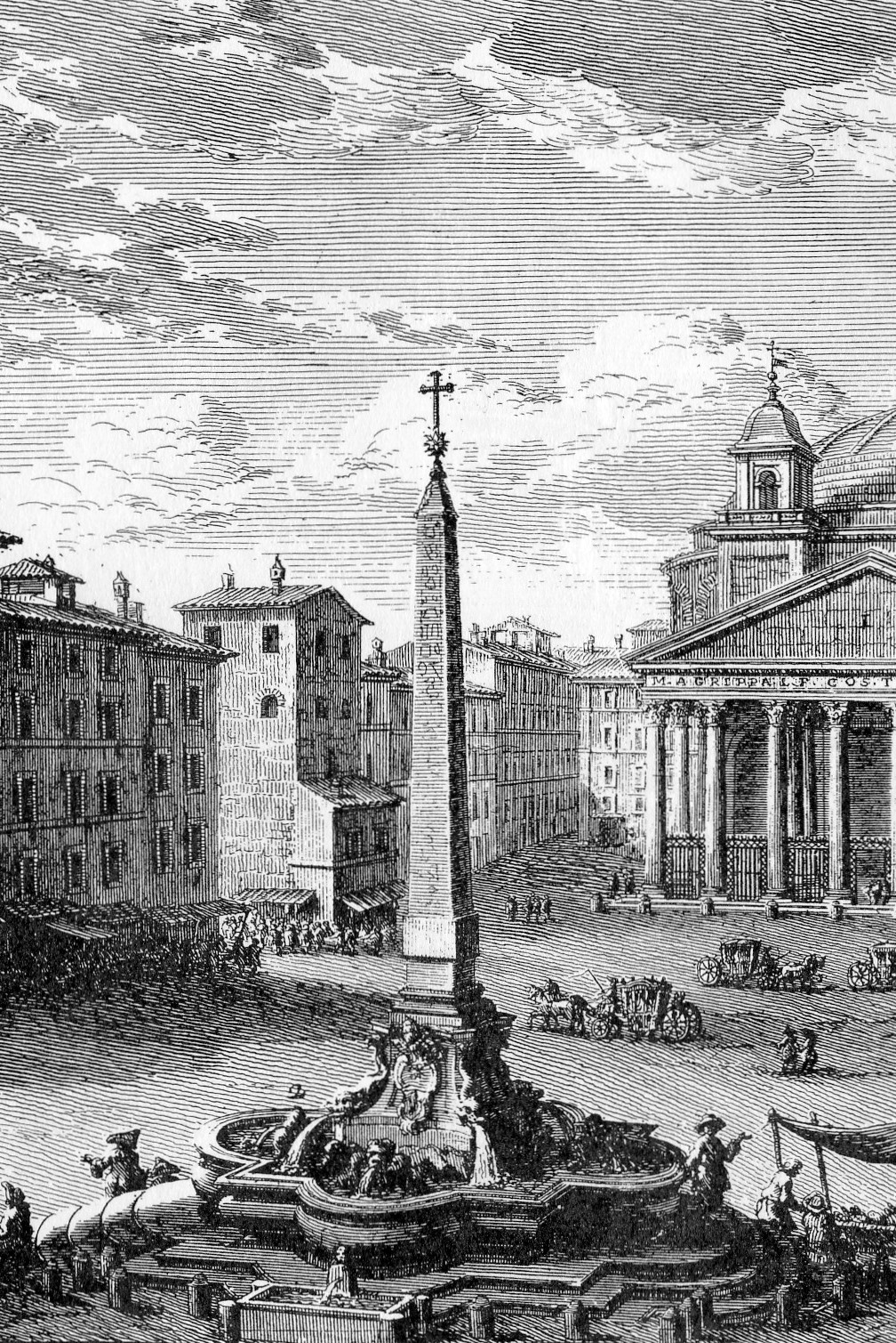 Particolare da incisione di Giuseppe Vasi (1710-1782). Illustrazione scannerizzata dal volume "LE FONTANE DI ROMA nelle vedute dei grandi incisori" - Il Cubo s.a.s., 1998